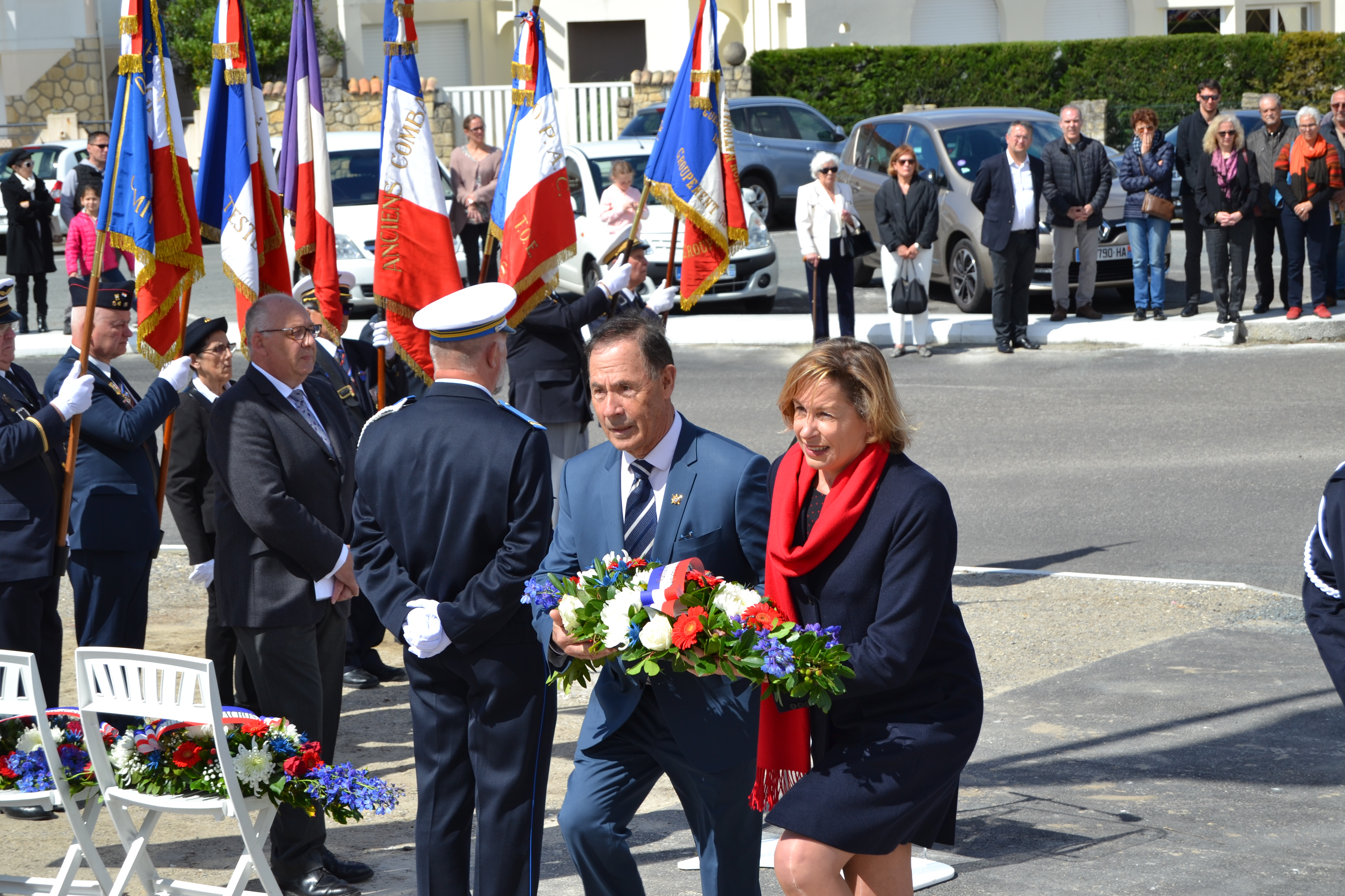 La sénatrice Nathalie Delattre avec le sénateur Alain Cazabonne déposant une gerbe au monument aux morts d'Arcachon lors de la Journée Nationale du souvenir de la déportation,dimanche 28 avril 2019.